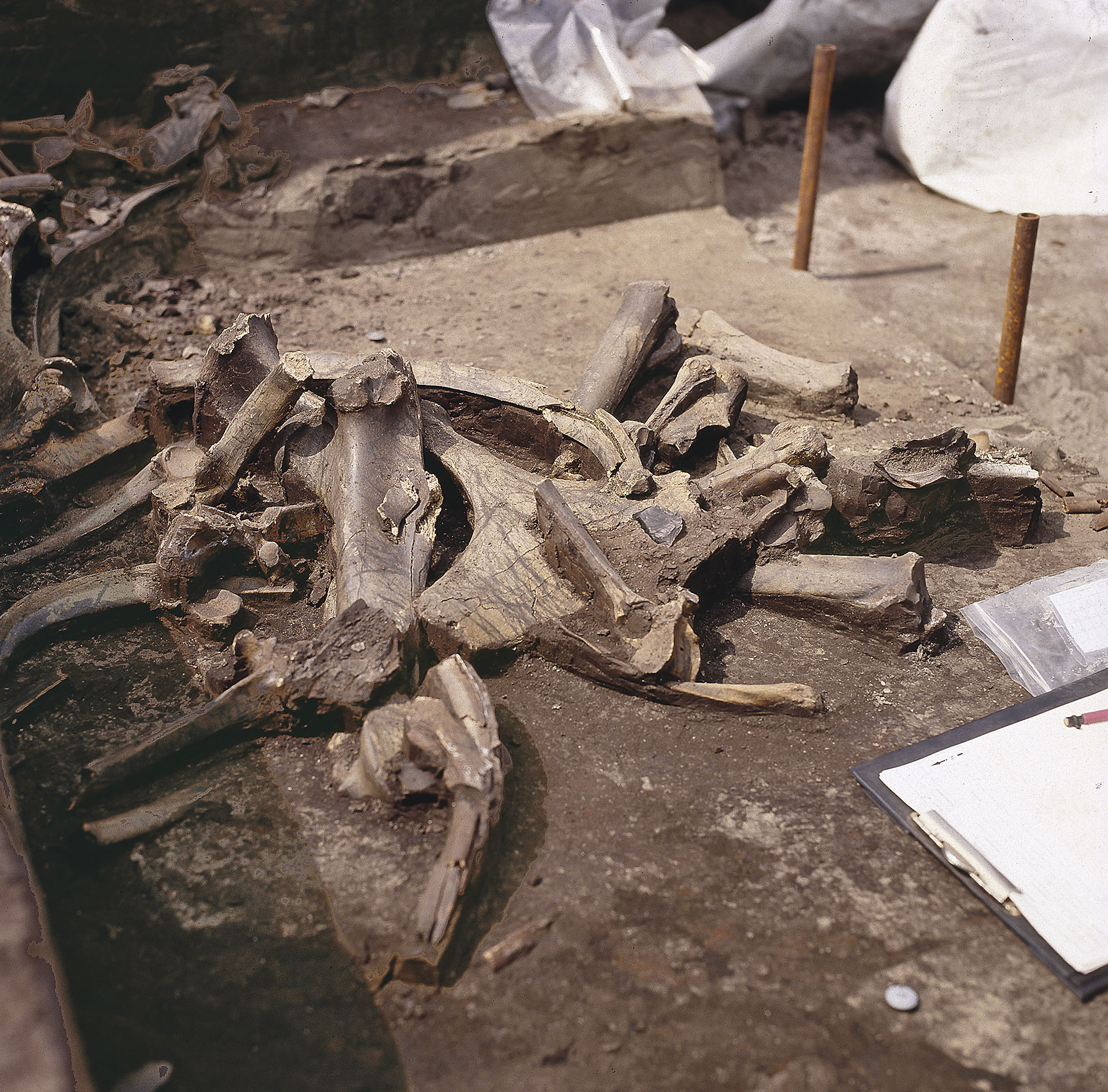 Knochen in Fundlage aus 13 II-4